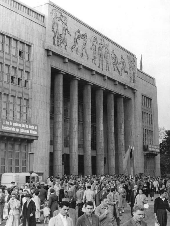 Berlin, Karl-Marx-Allee, "Deutsche Sporthalle" Zentralbild Sturm Ulter 29.5.1958 Solidaritätskundgebung mit dem französischen Volk gegen Faschismus in der Sporthalle in Berlin Der Berliner Ausschuß der Nationalen Front rief die Berliner am 29.5.1958 zu einer Solidaritätskundgebung mit dem französischen Volk gegen die faschistischen Putschversuche auf. Auf dieser Kundgebung, die in der Sporthalle durchgeführt wurde, sprach u.a. der Sekretär des Zentralkomites der SED, Prof. Albert Norden. (Siehe ADN-Meldung v. 29.5.58) UBz: Tausende Kundgebungsteilnehmer verlassen die Sporthalle nach der Kundgebung.